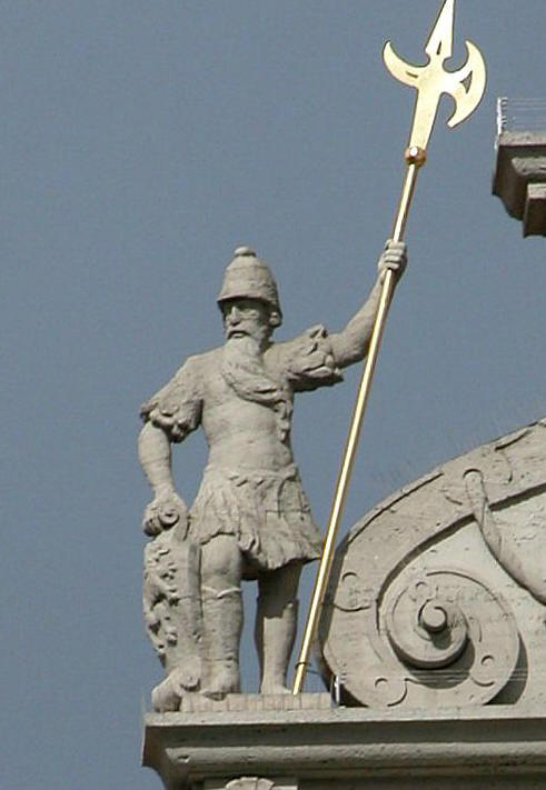 Ritter auf dem Braunschweig Gewandhaus